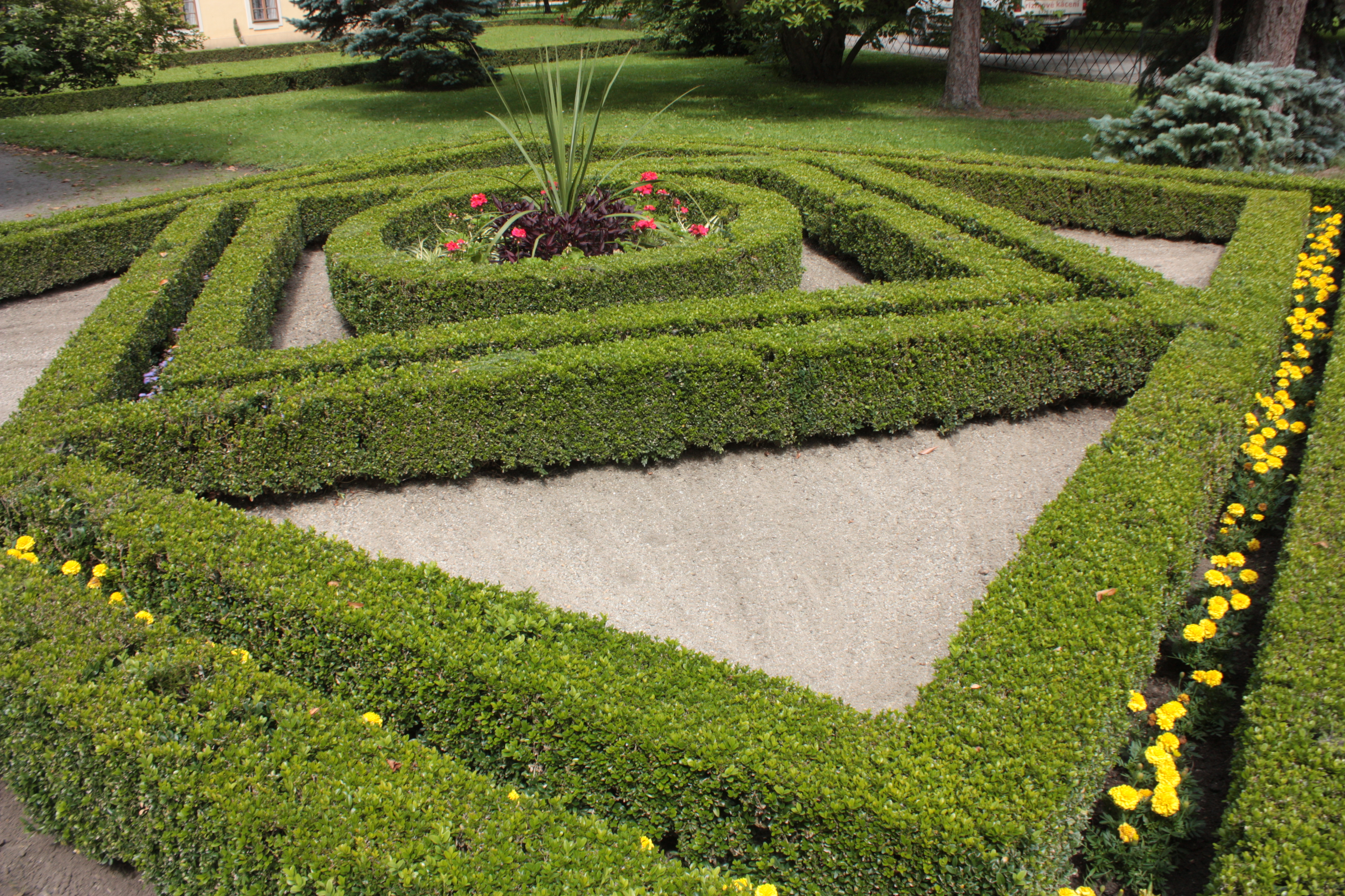 Živý plot , Kroměříž, Květná zahrada